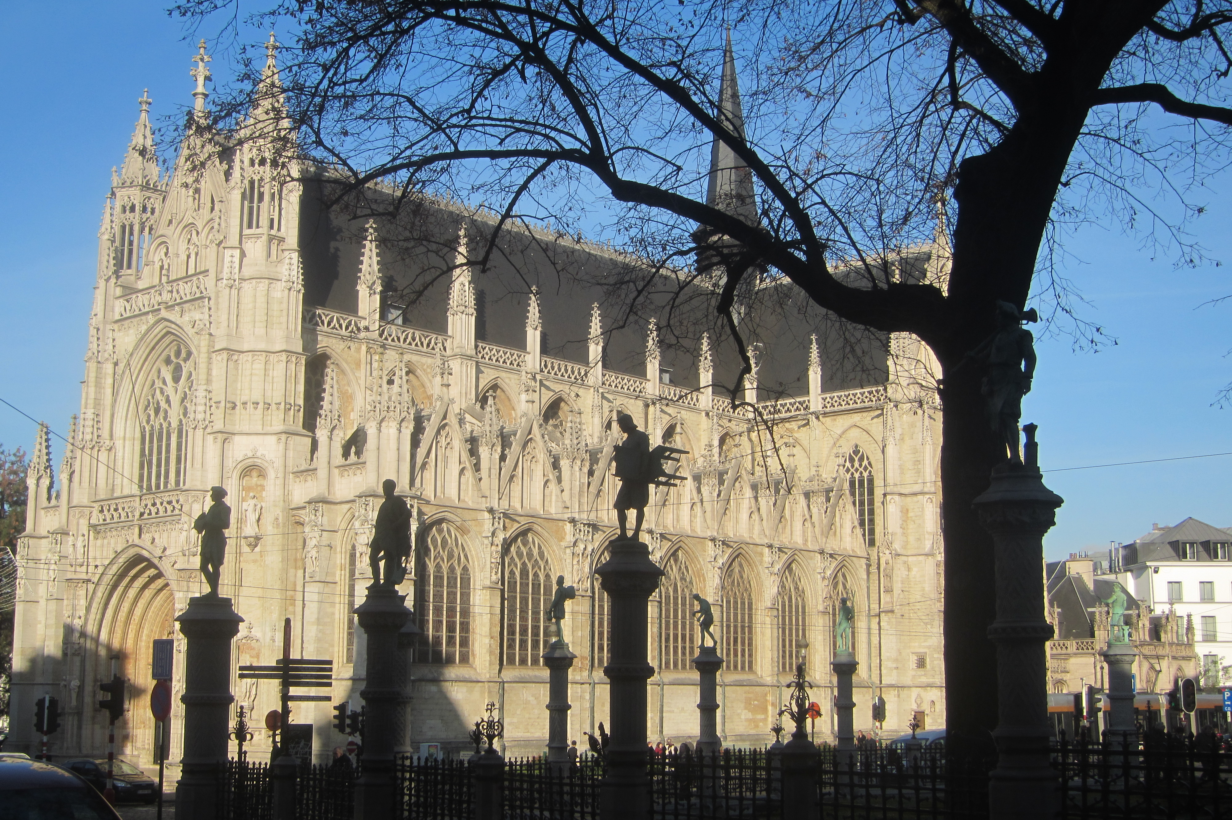 Onze-Lieve-Vrouw-ter-Zavelkerk, Brussel, met vooraan de Kleine Zavel